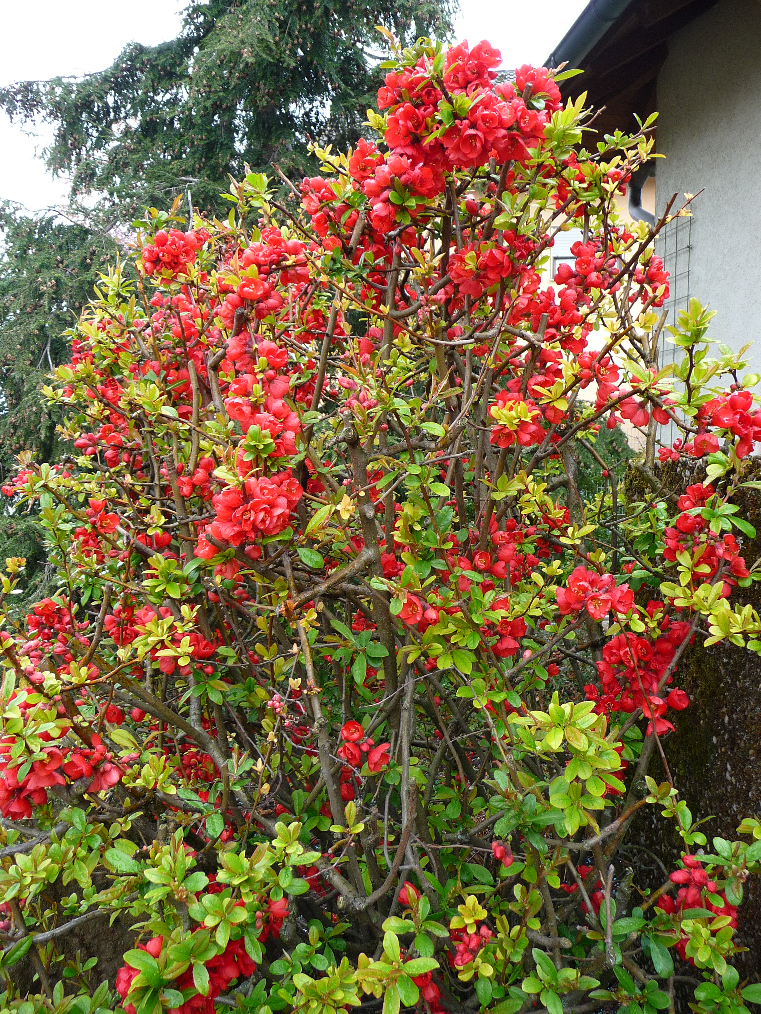 Japanische Zierquitte (Chaenomeles speciosa), fotografiert in Nordbaden (Baden-Württemberg, Deutschland)